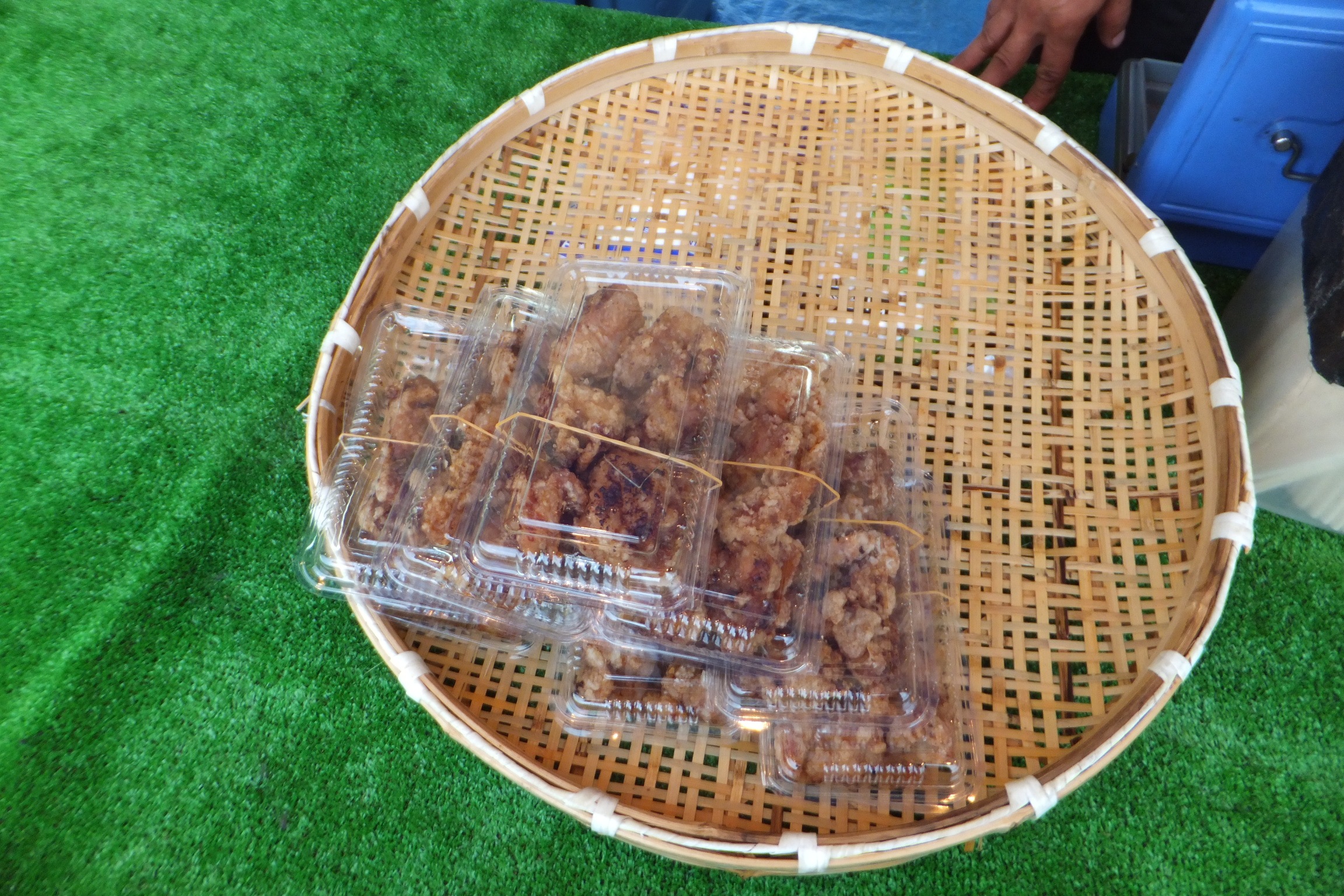 中津から揚げ